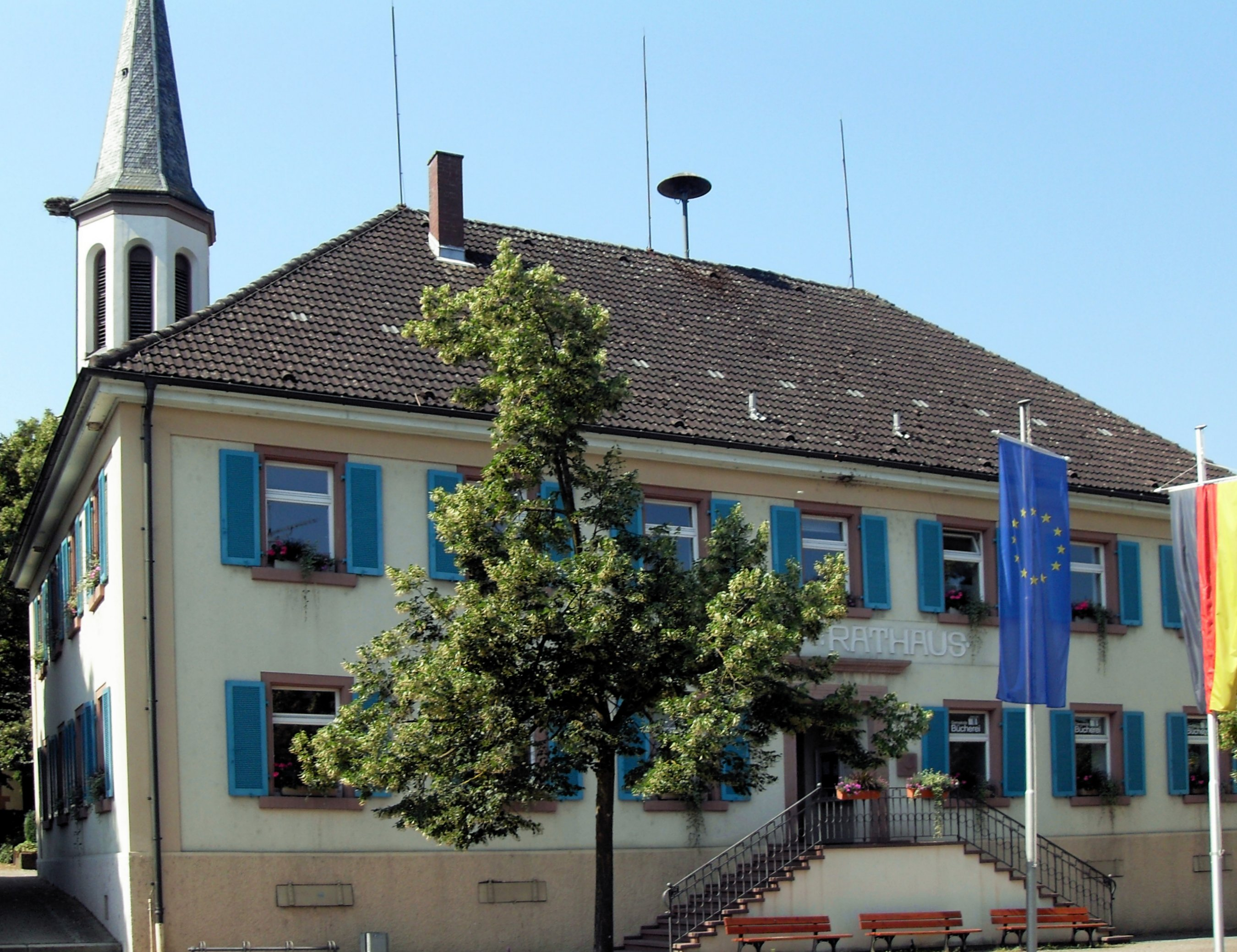 als Rathaus-und Schulgebäude in Vörstetten erbaut, heute Rathaus und Gemeindebibliothek